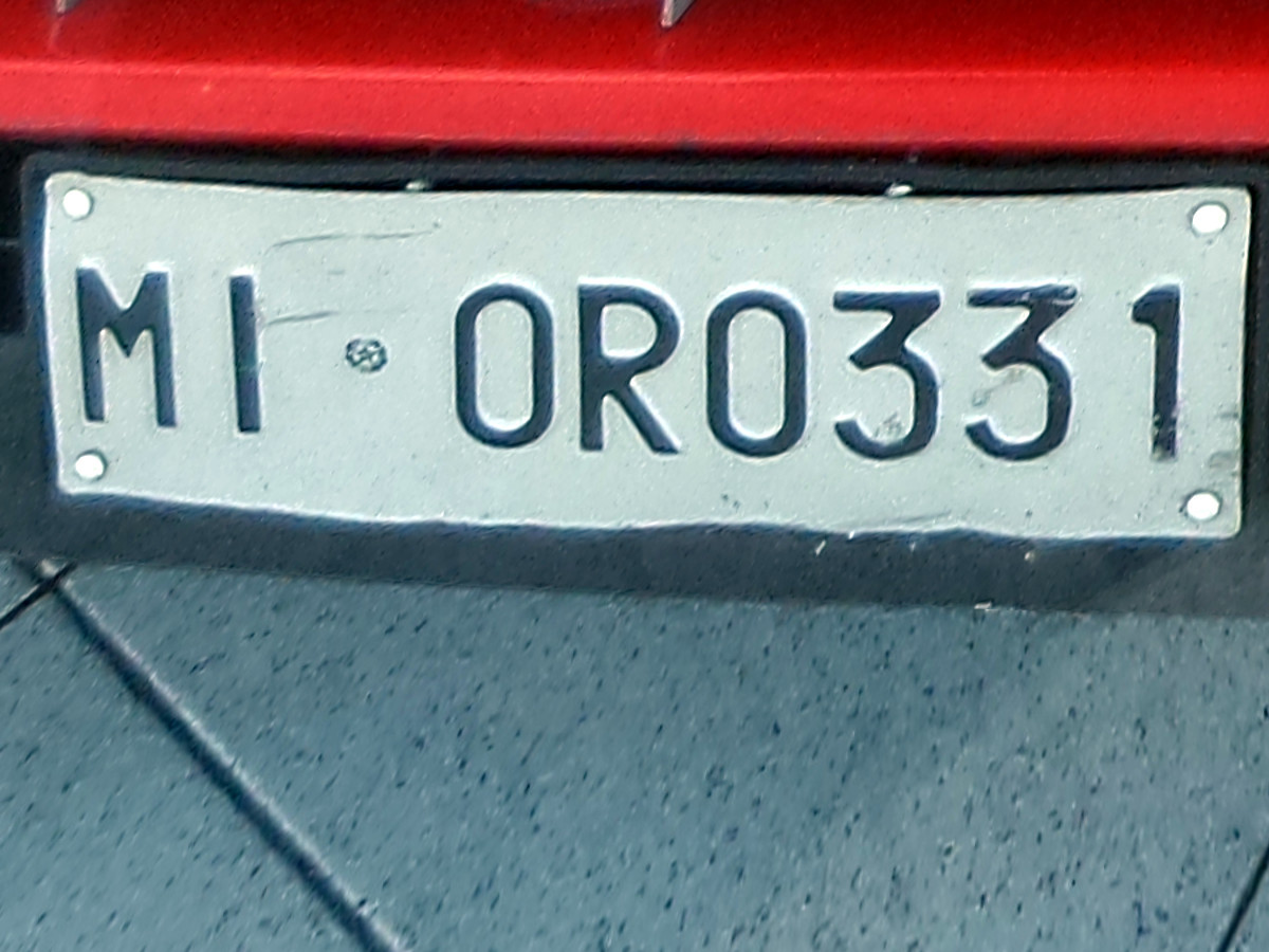 Una targa automobilistica italiana che sembra personalizzata (non esistono targhe personalizzate nella serie con province e anche nell'ultima serie pur previste dalla legge, non sono mai state distribuite, a quanto se ne sa); in realtà è solo una combinazione di lettere e numeri (le O di ORO sono in realtà zeri).